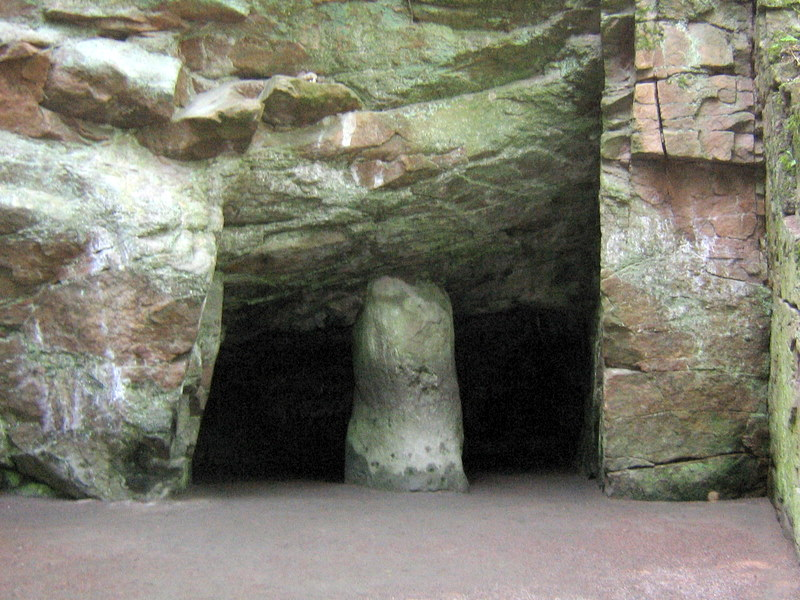 Грот Калипсо.